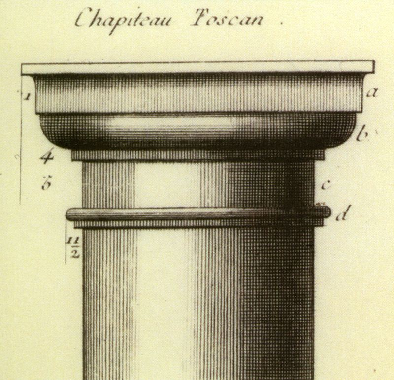 Tuskansk kapitel